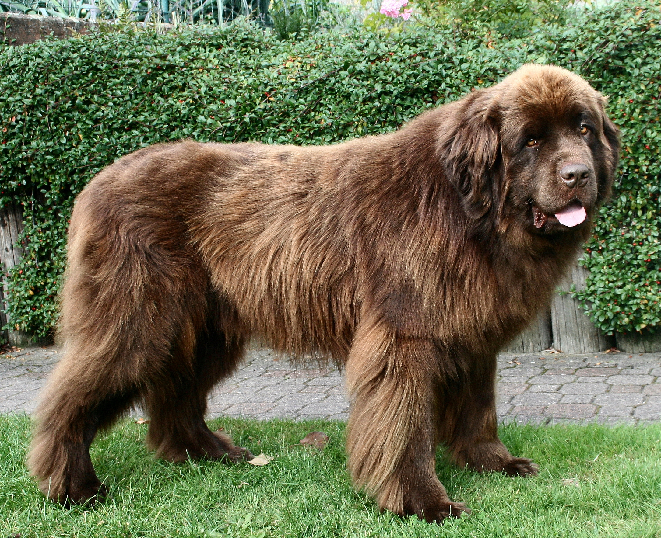 Brauner Neufundländer Rüde